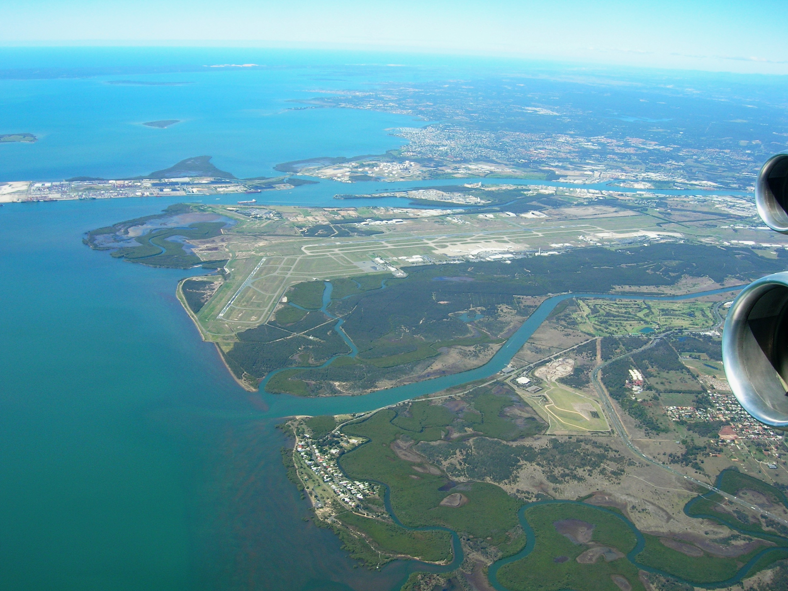 i090806 020